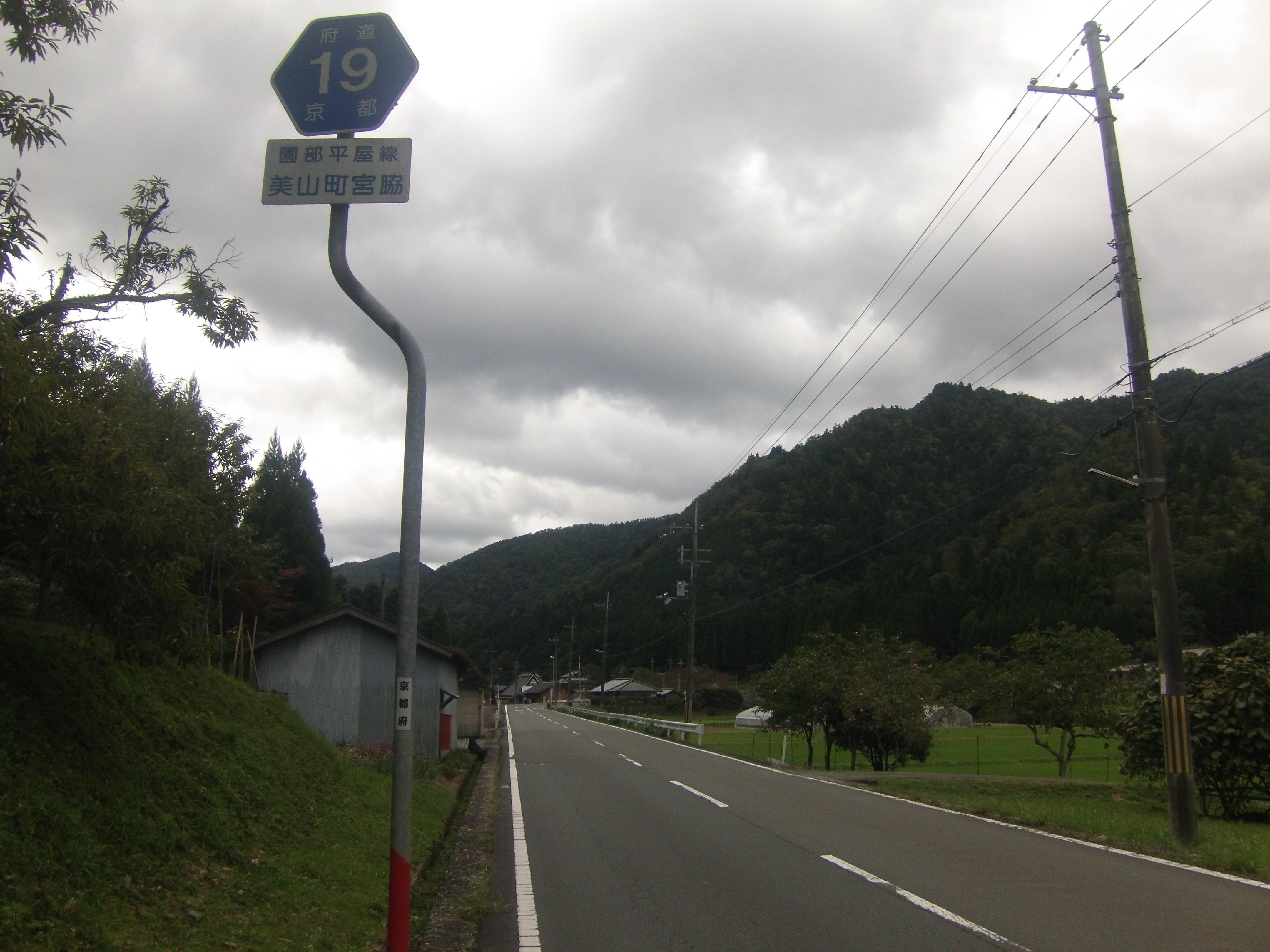 南丹市美山町宮脇の京都府道19号線